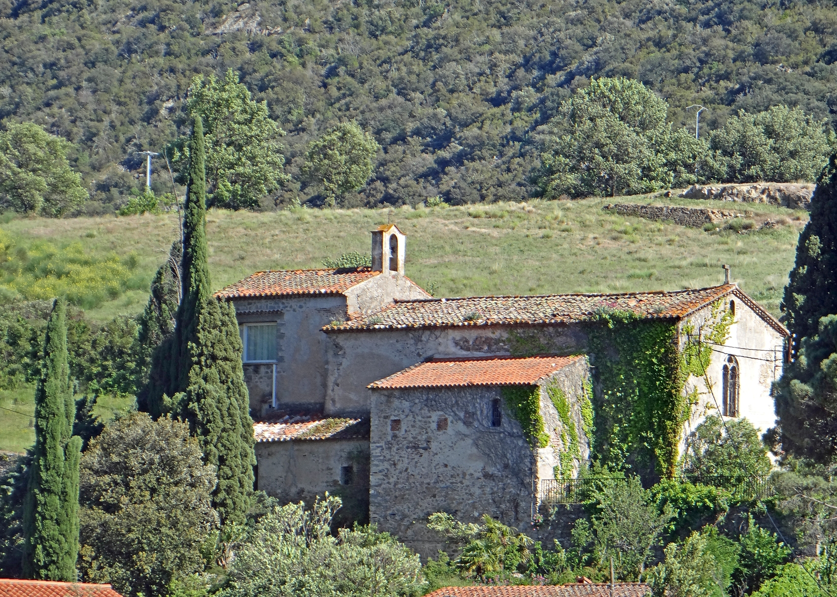 L'ancien couvent des Capucins à Céret Le couvent des Capucins est construit en 1584 par l'ordre monastique des Capucins. En 1913, le peintre Franck Burty Haviland (1878-1972) riche héritier du célèbre porcelainier de Limoges Charles Havilland, s'y installe définitivement après plusieurs séjours en Vallespir. En 1948, Franck Burty Haviland aide Pierre Brune à la création du Musée d'Art Moderne de Céret. De nombreux artistes du 20è siècle viendront séjourner aux Capucins. Site de MUSIC, le musée des instruments, Céret